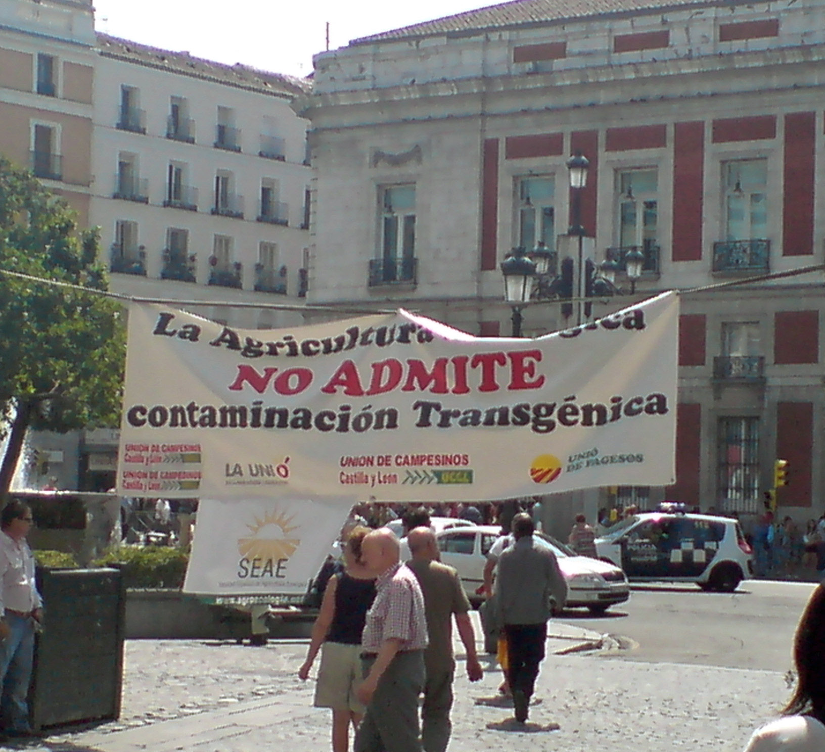 Protesta de productores de agricultura orgánica contra los transgénicos en la Puerta del Sol de Madrid (España).